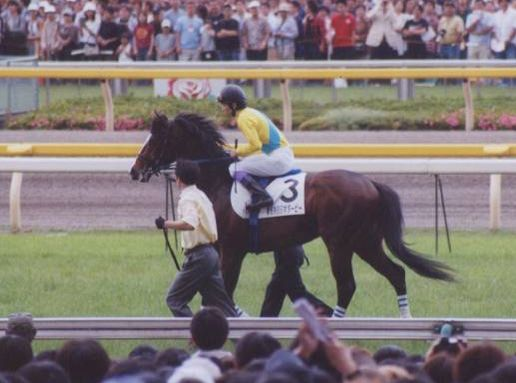 タニノギムレット（2002年5月26日、東京競馬場、撮影者本人）